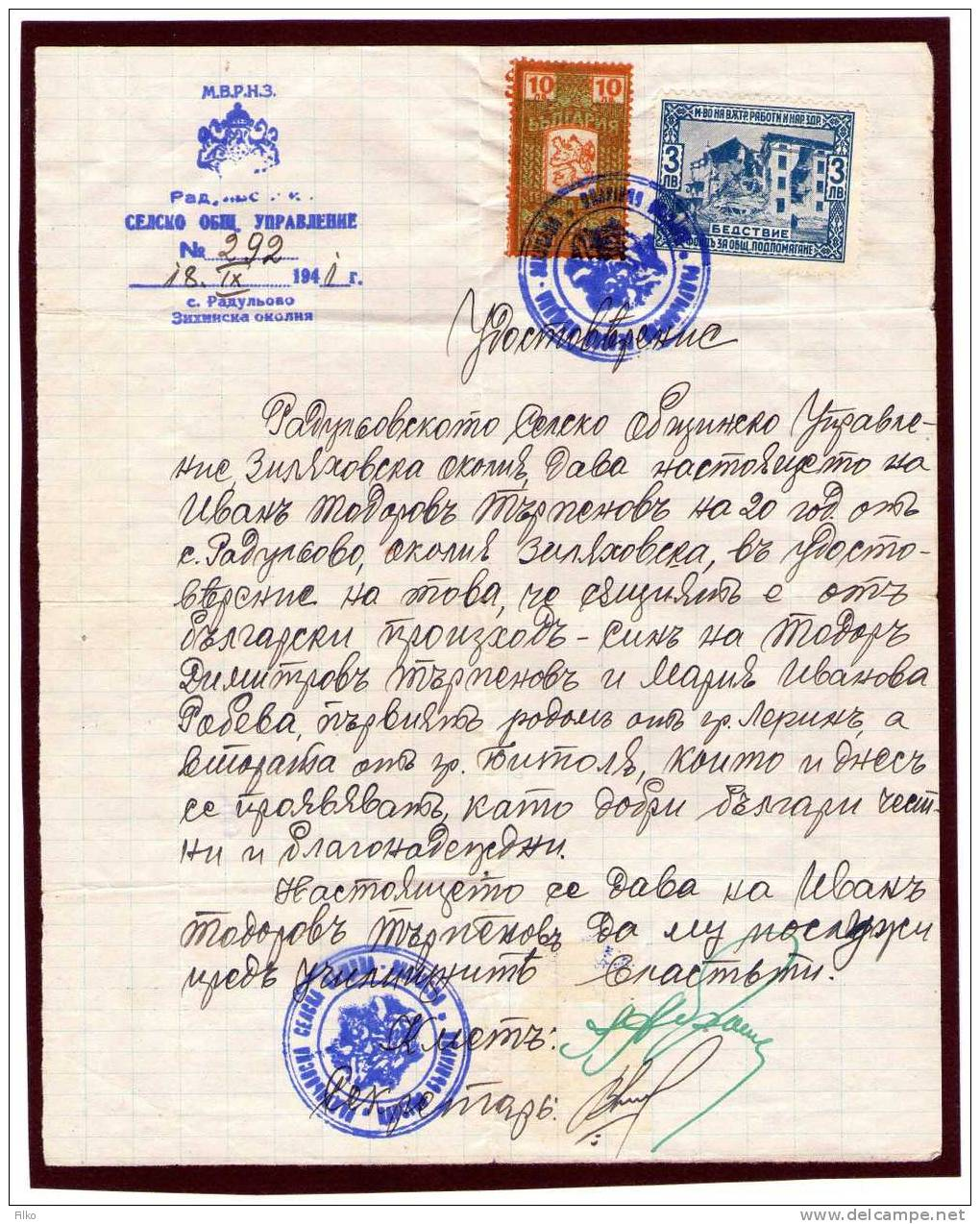 Документ на кметство Радульово (Радолиово) от 1941 г.